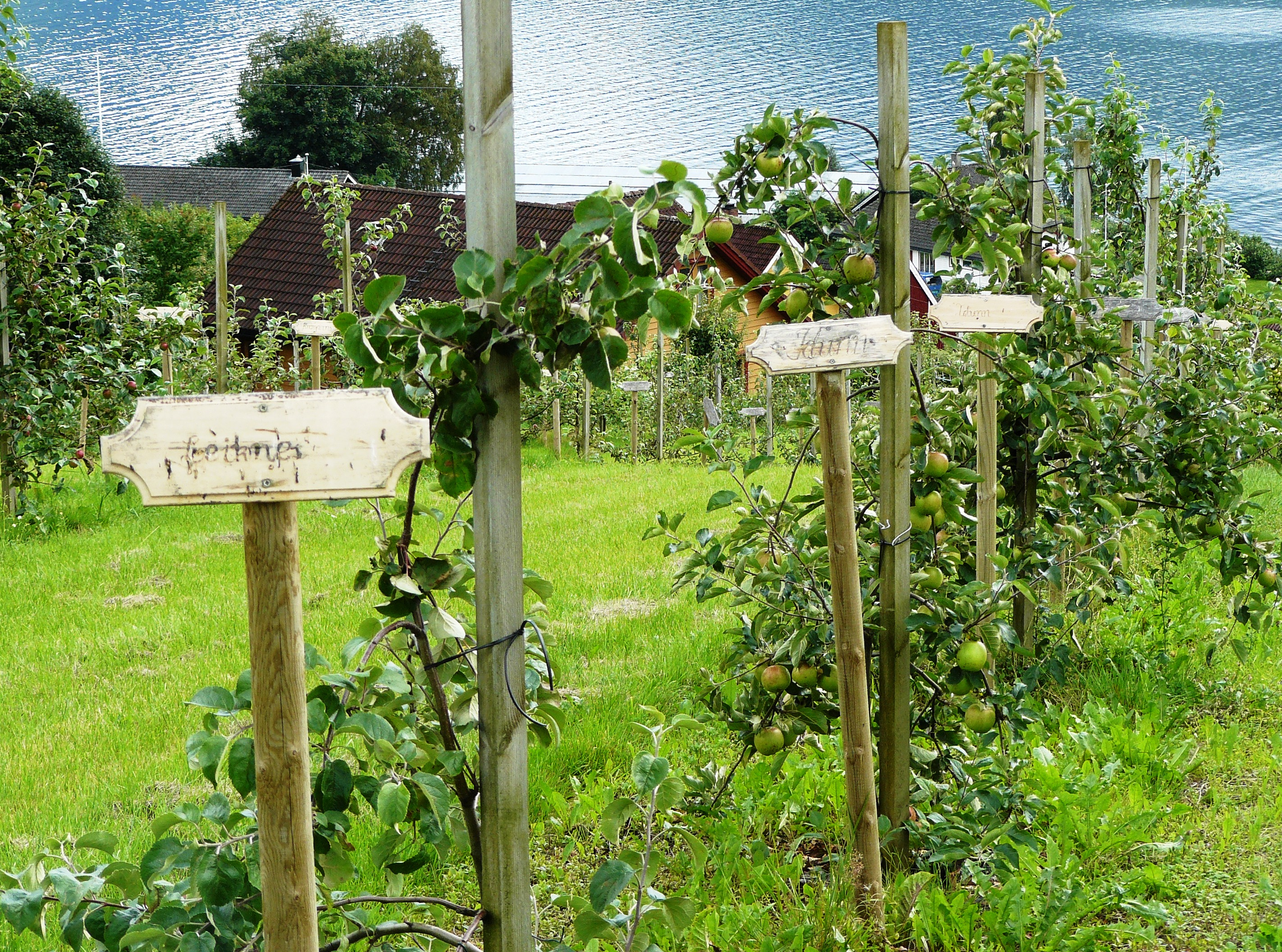 Karnilsfarm - apple genome project.jpg